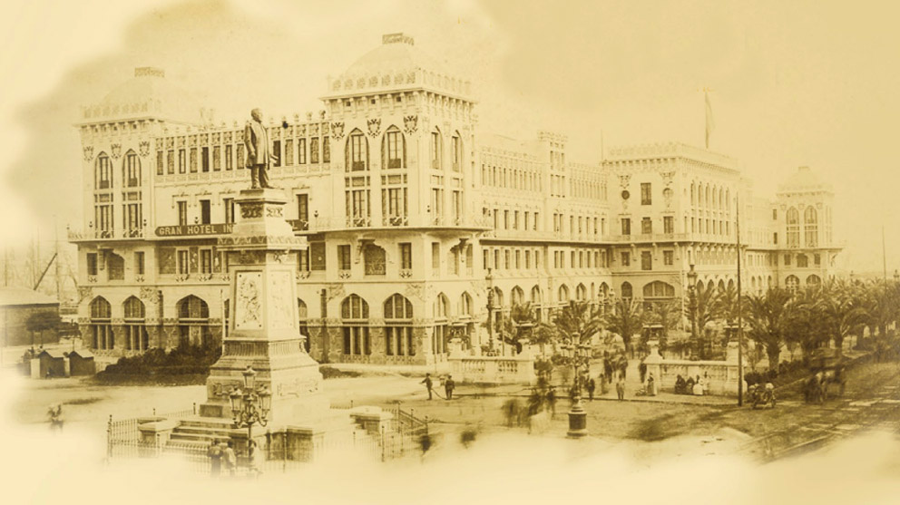 Gran Hotel Internacional. (In etwa) übersetzte Originalbeschreibung aus der Quelle: „In unserer Sammlung von fotografischen Dokumenten befindet sich dieses 27×39,5 cm große Bild eines unbekannten Fotografen.“